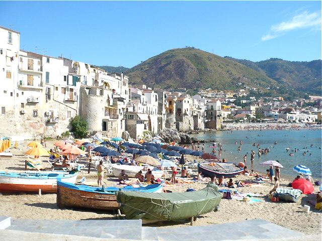 cefalu